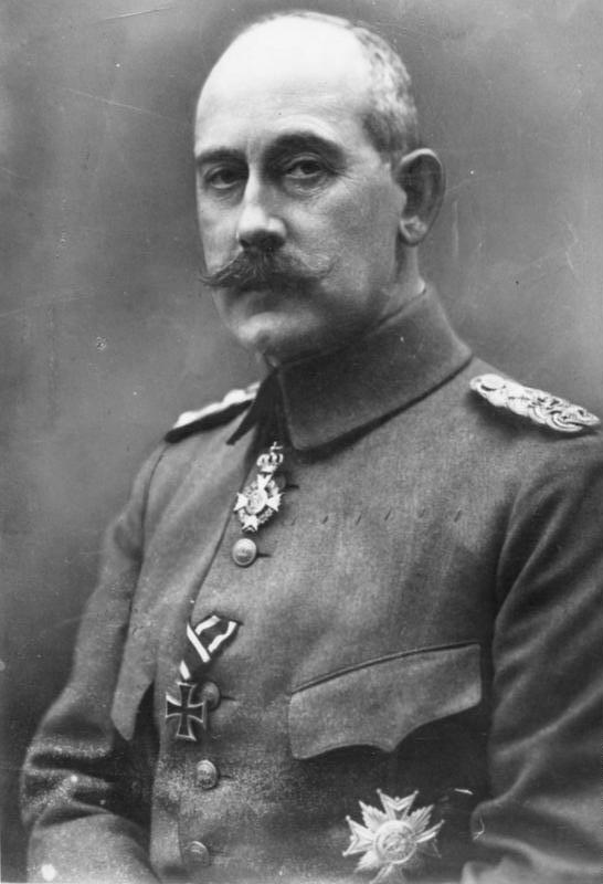 Prinz Max von Baden Porträt Maximilian Alexander Friedrich Wilhelm Prinz von Baden (Prinz Max von Baden) in Uniform eines Generals mit Orden Abgebildete Personen: Baden, Max von: 1867-1929, Generalmajor, Reichskanzler, Ministerpräsident von Preußen, Deutschland